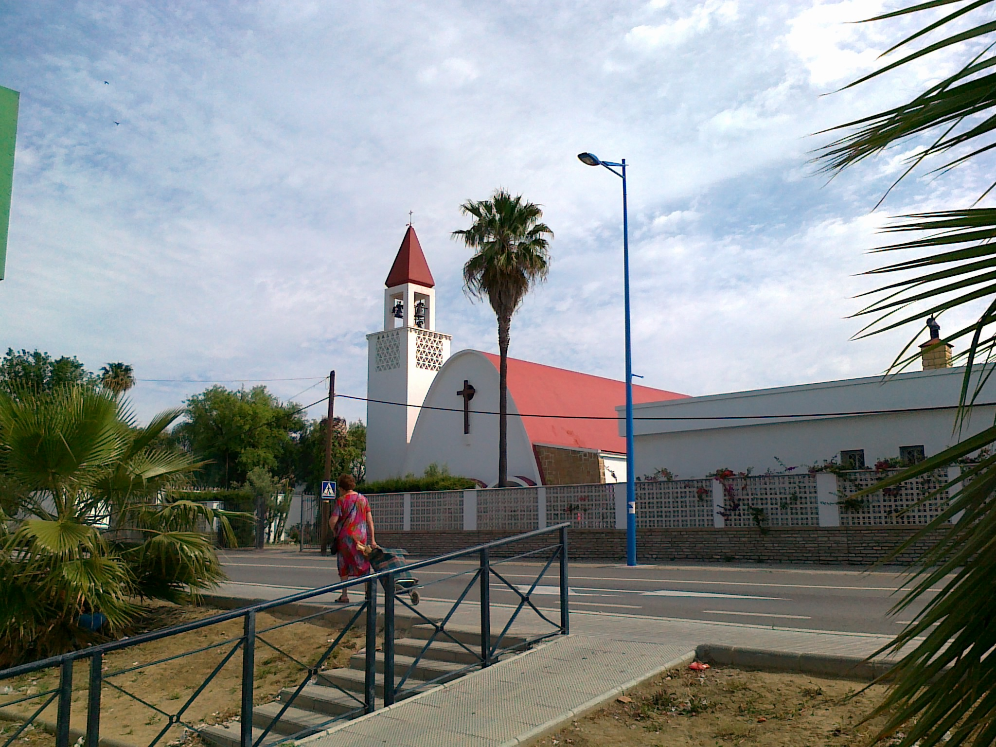 Poblado de Campamento, en San Roque (Cádiz, España)